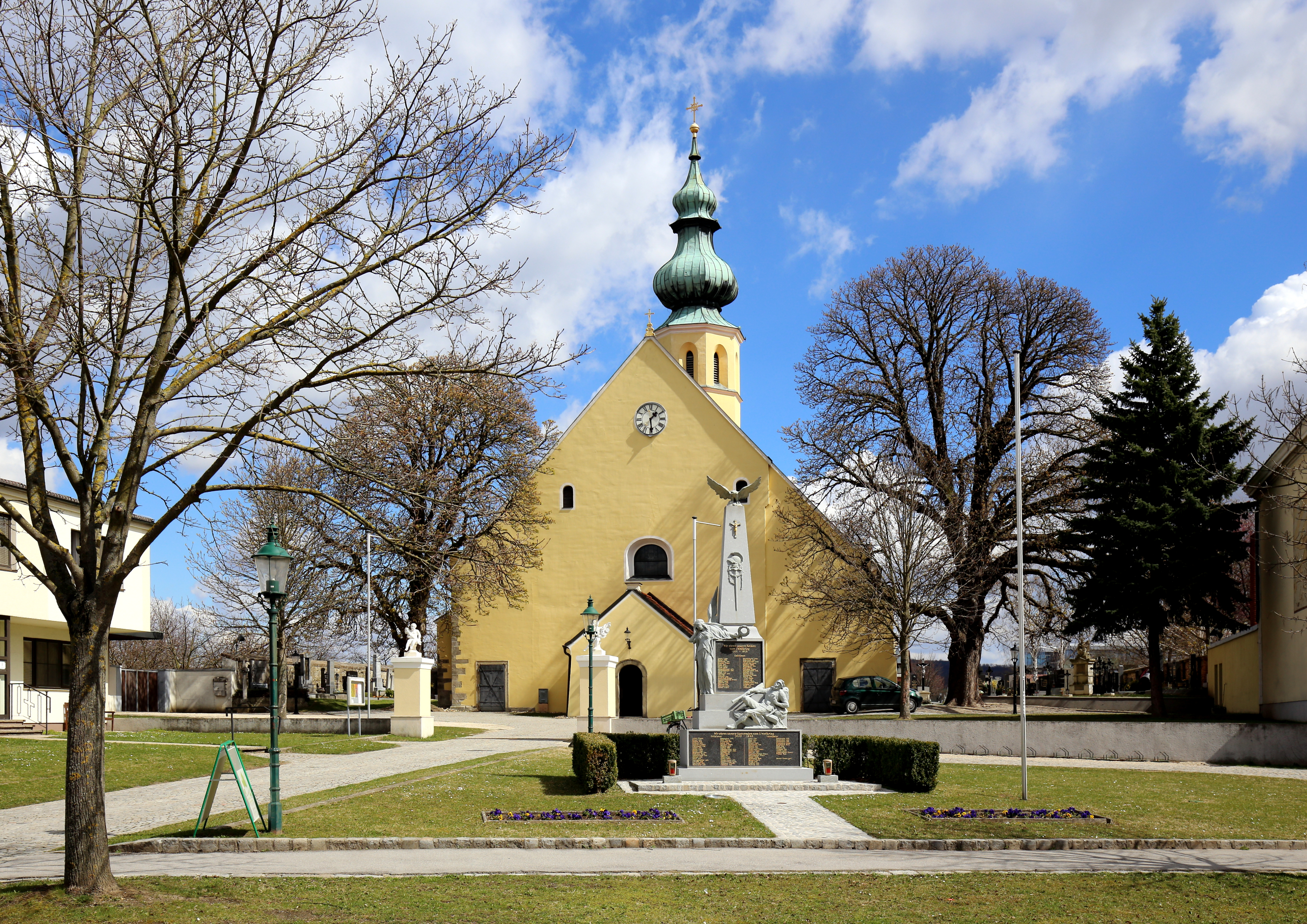 Westansicht der katholischen Pfarrkirche hl. Hippolyt in Rückersdorf, ein Ortsteil der niederösterreichischen Marktgemeinde Harmannsdorf.